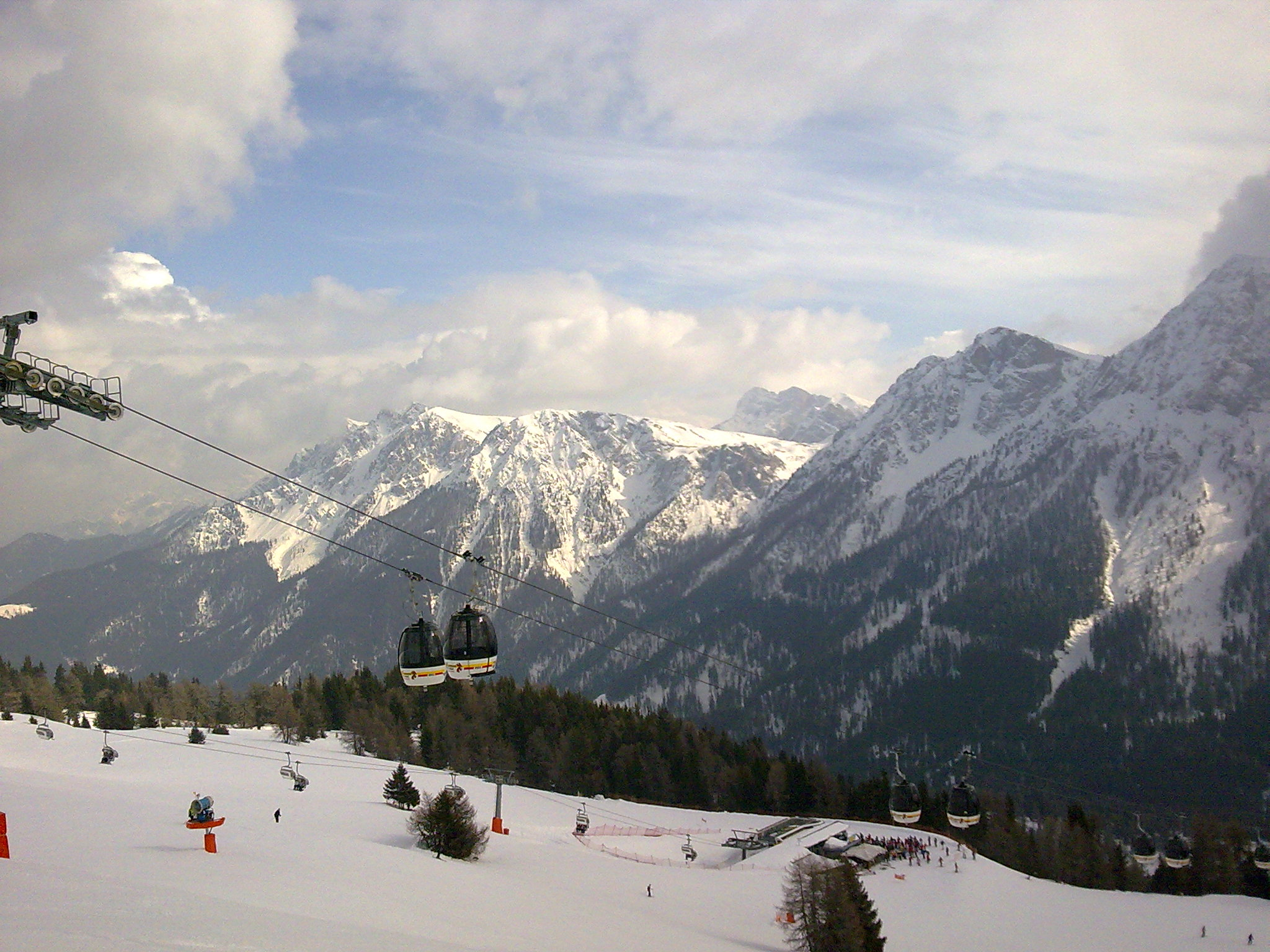 kronplatz